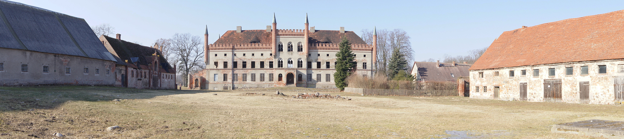 Schloss Brook